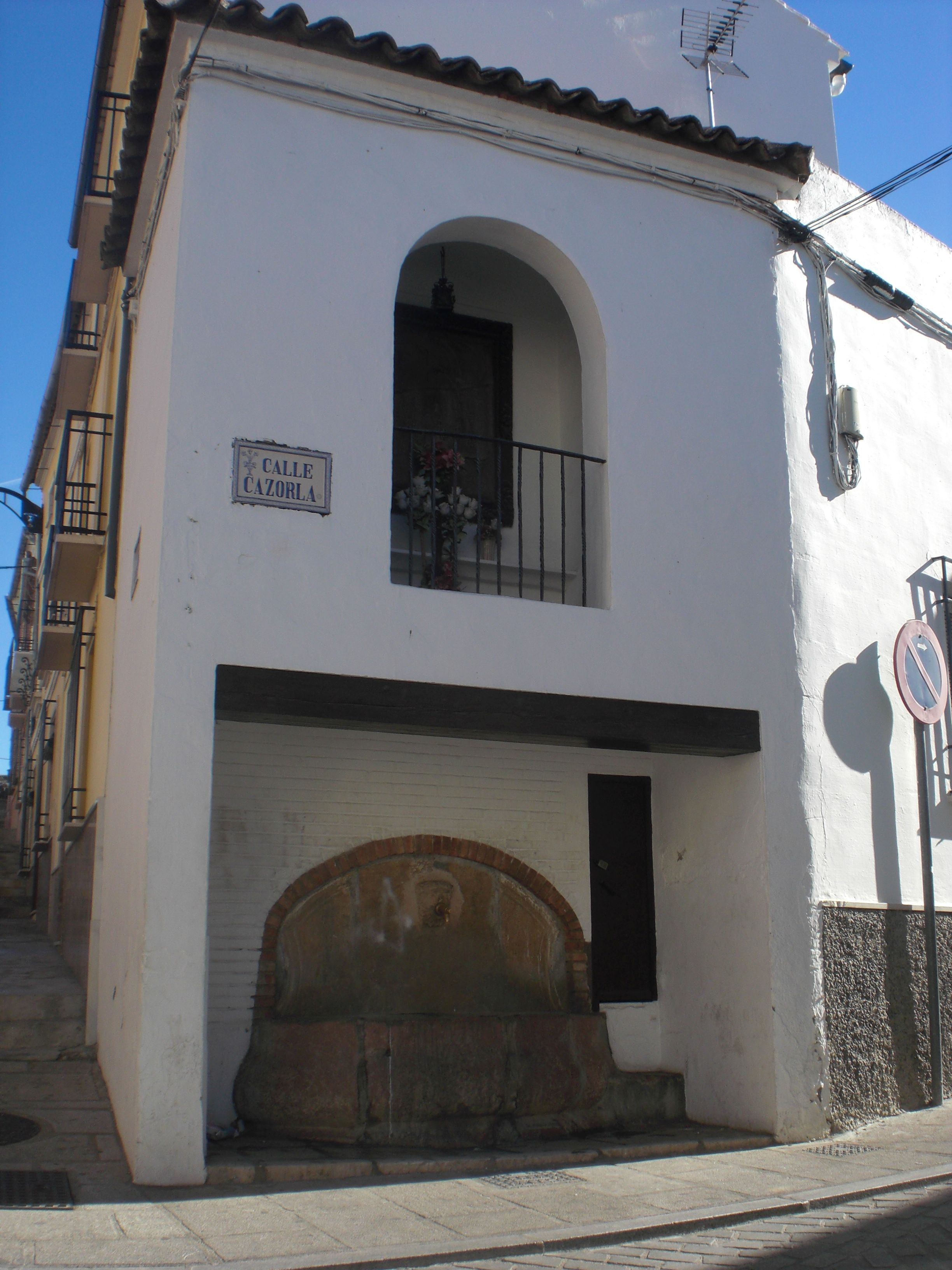 Angulo de tipa popola arkitekturo, kun fonto.